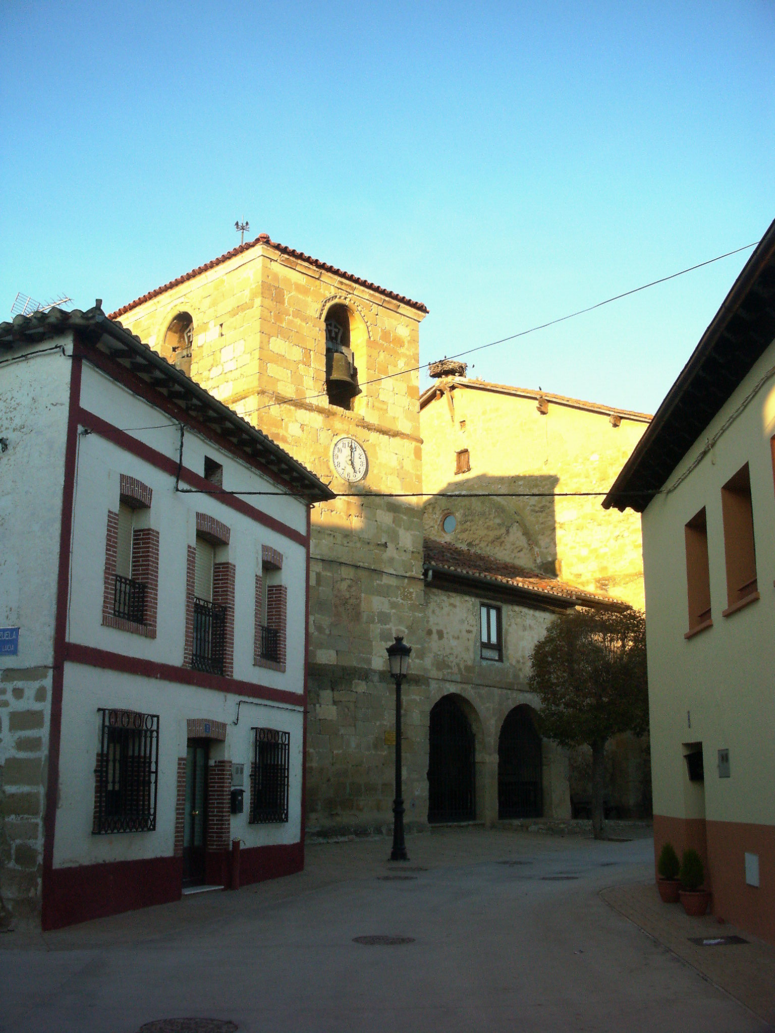 Zanbranako Argiñe Deunaren eliza.